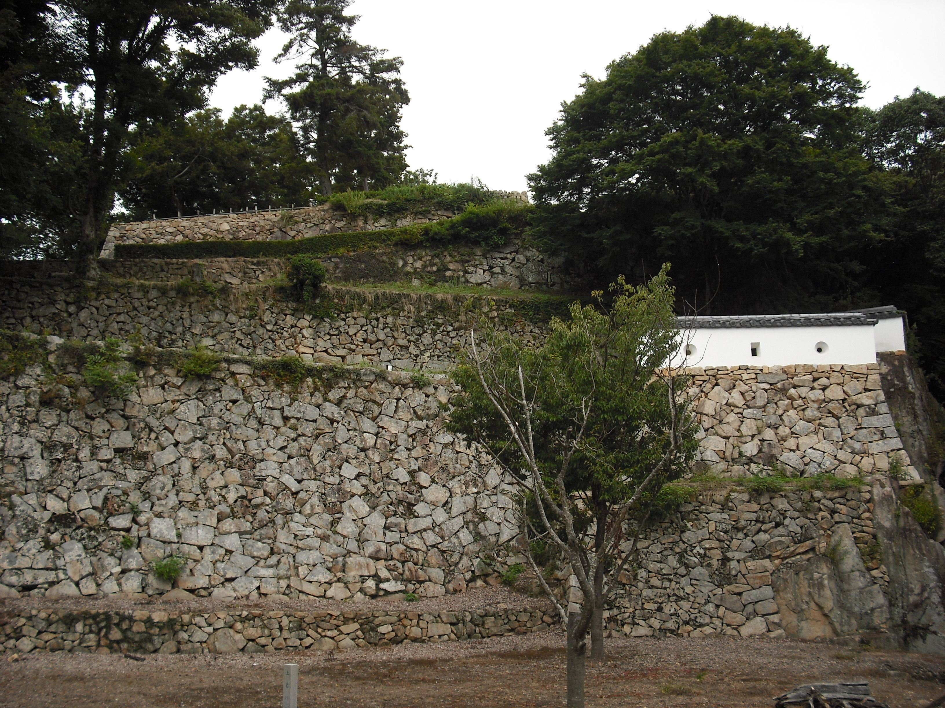 備中松山城 石垣群